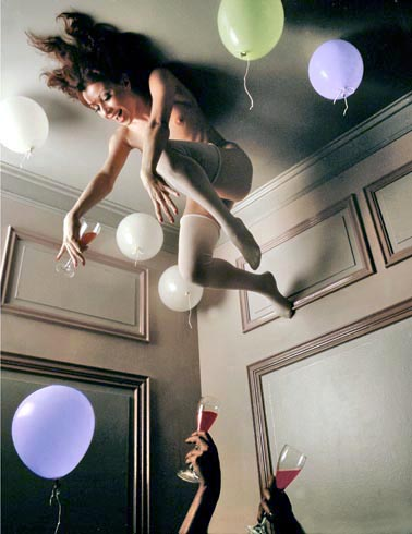 Gerhard_vormwald-uschi,_balloons_-mannheim-1975